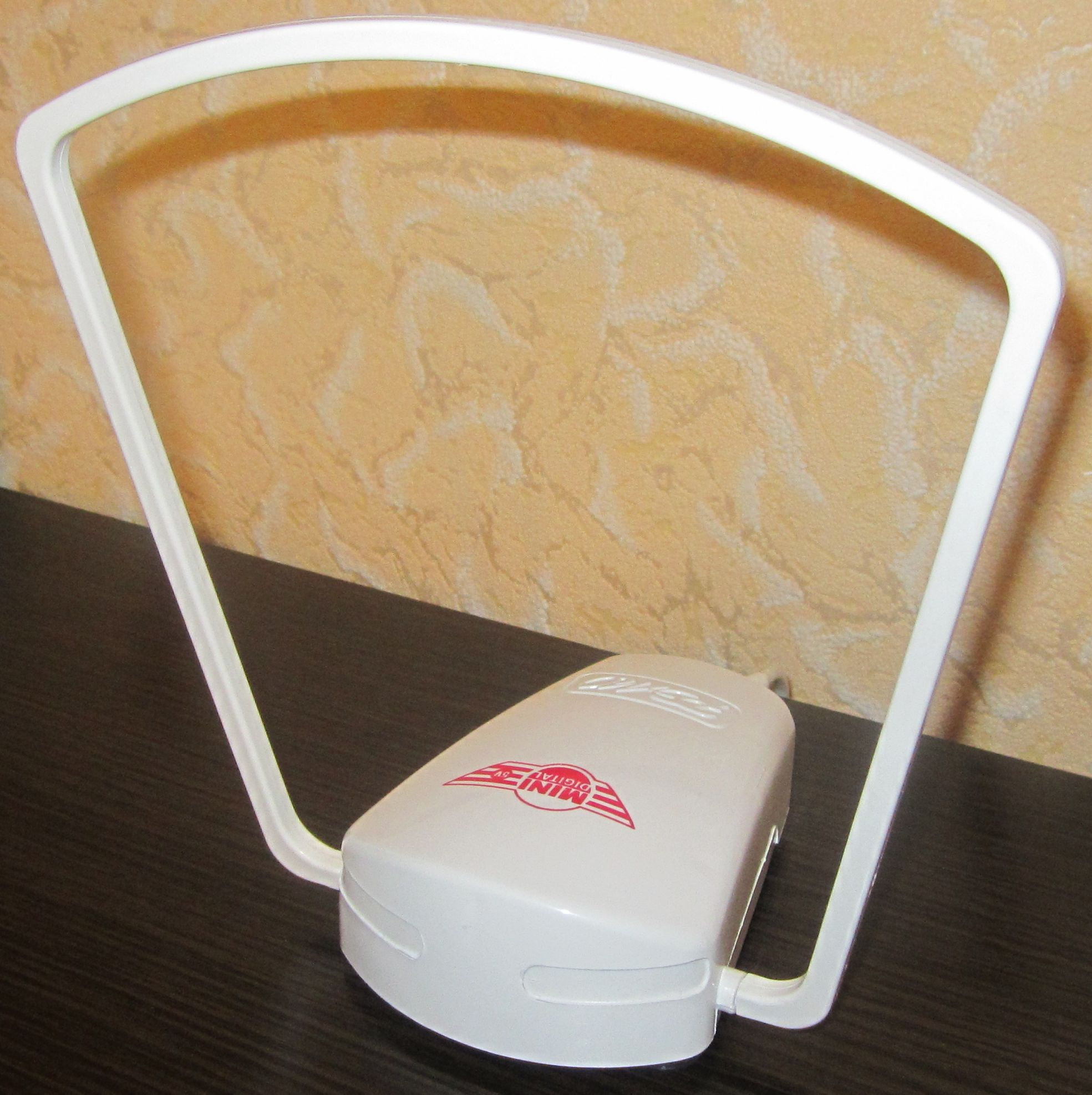 телевизионная комнатная дециметровая антенна в виде рамки